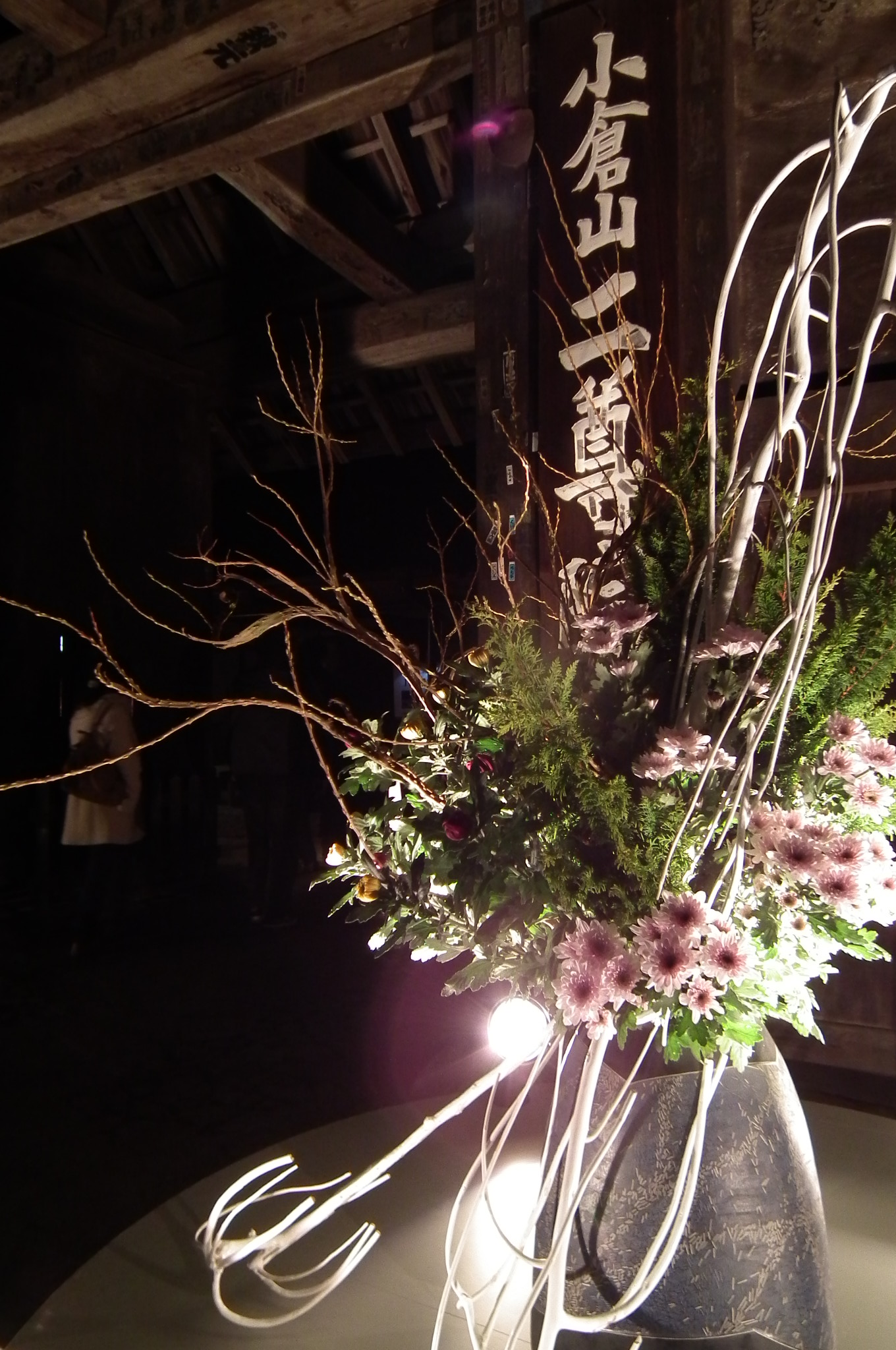 Arashiyama Hanatōro 嵐山花灯路・二尊院